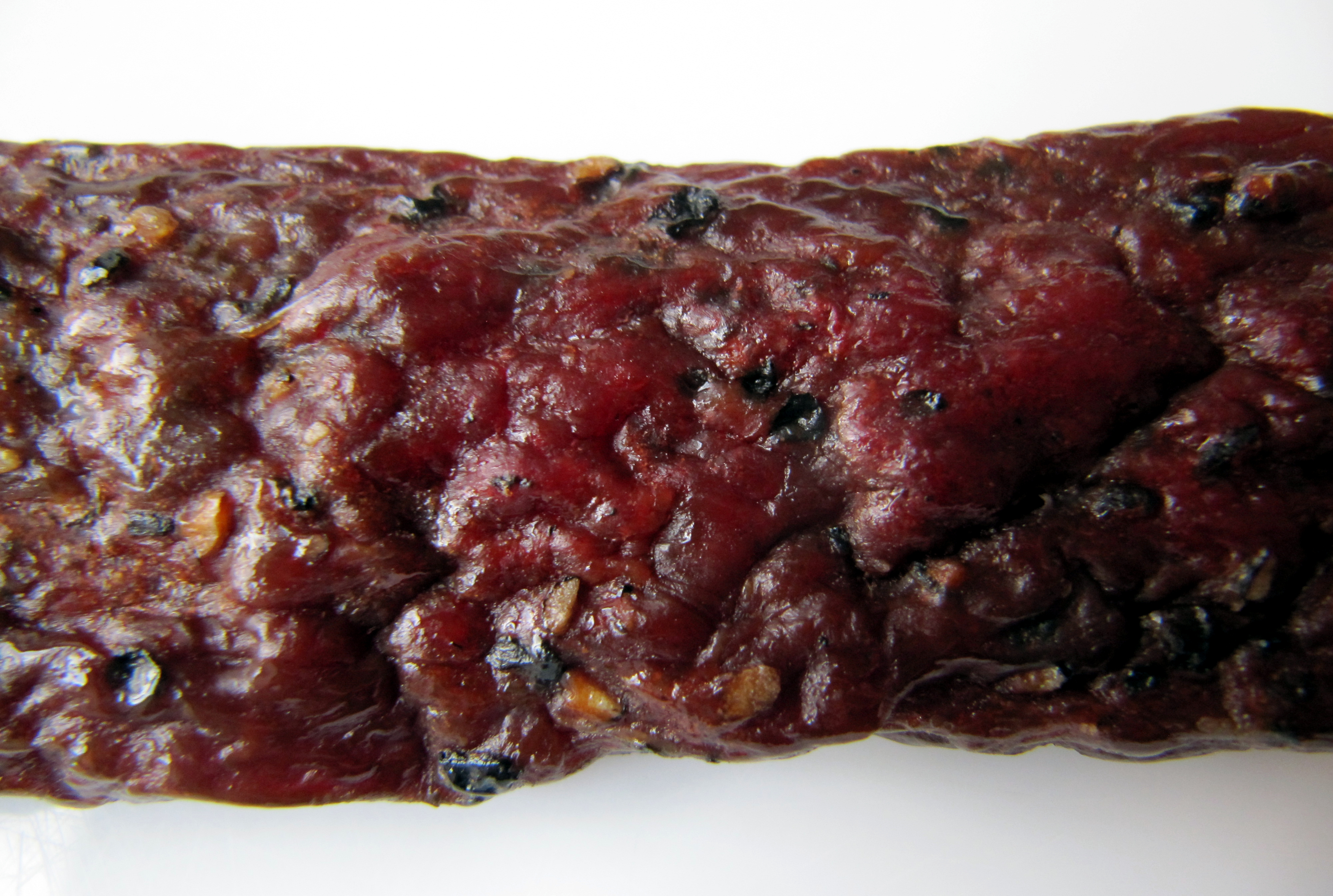 JL_Dörrfleisch_1